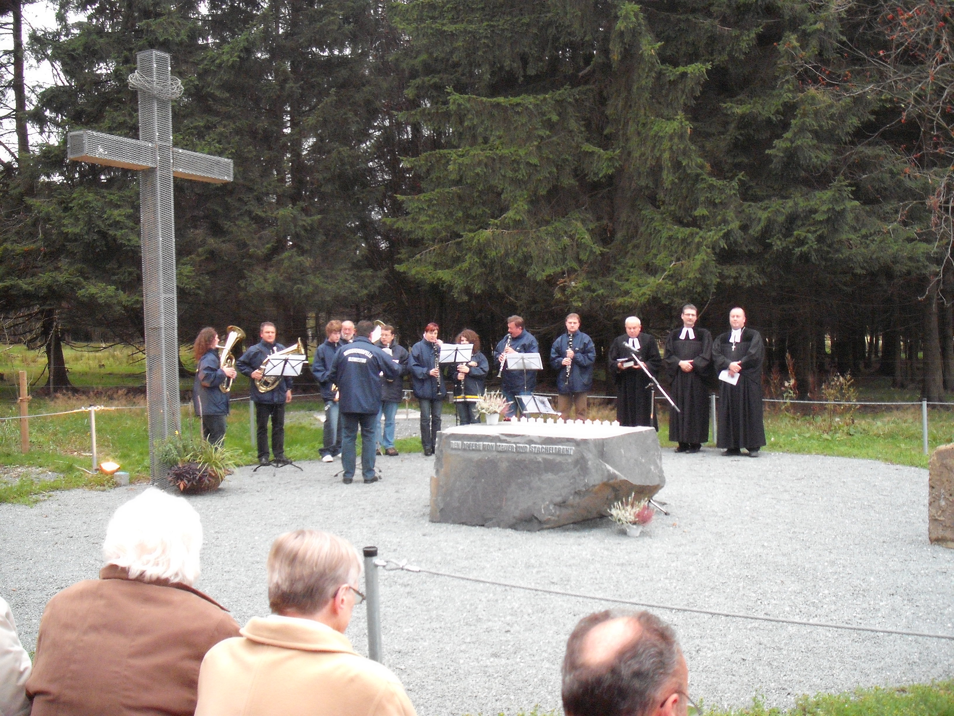 Anläßlich des Rennsteigkirchentages 2009 wurde das Mahnmal an der Schildwiese, direkt auf der Landesgrenze zwischen Bayern und Thüringen, eingweiht. Es ist den "Opfern von Mauer und Stacheldraht" gewidmet und möchte zur Andacht gemahnen.